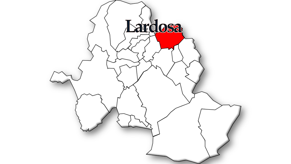 População